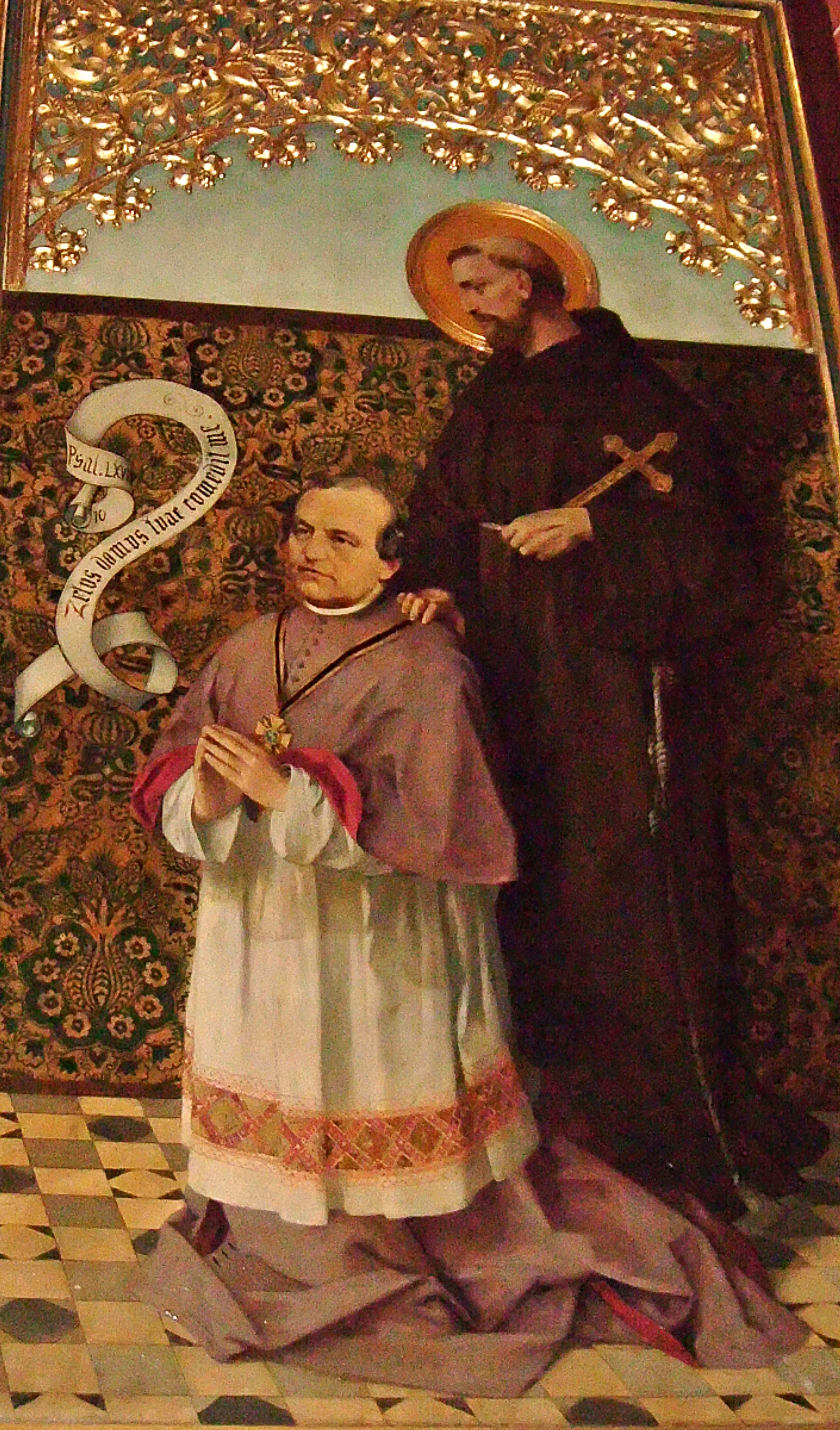 Ernst Franz August Münzenberger (1833-1890), Dompfarrer in Frankfurt am Main, auf einem Altarbild von Heinrich Nüttgens, Kaiserdom Frankfurt.